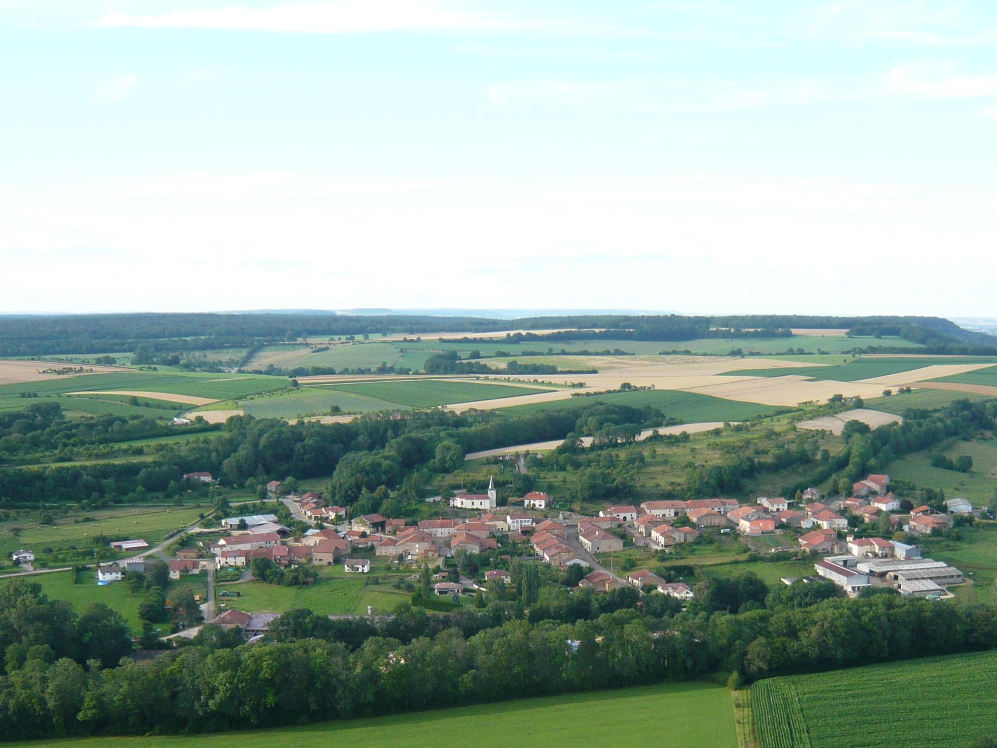 Photo du village de Beuvezin en 2012